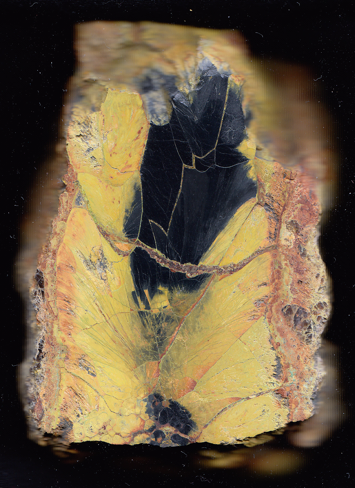 La partie en noir est de la pechblende pure. Les hydroxydes (jaunes) d'uranium constituent l'altération de la pechblende. Echantillon poli pour l'expérience de Becquerel. Provenance : La Commanderie, Vendée, France